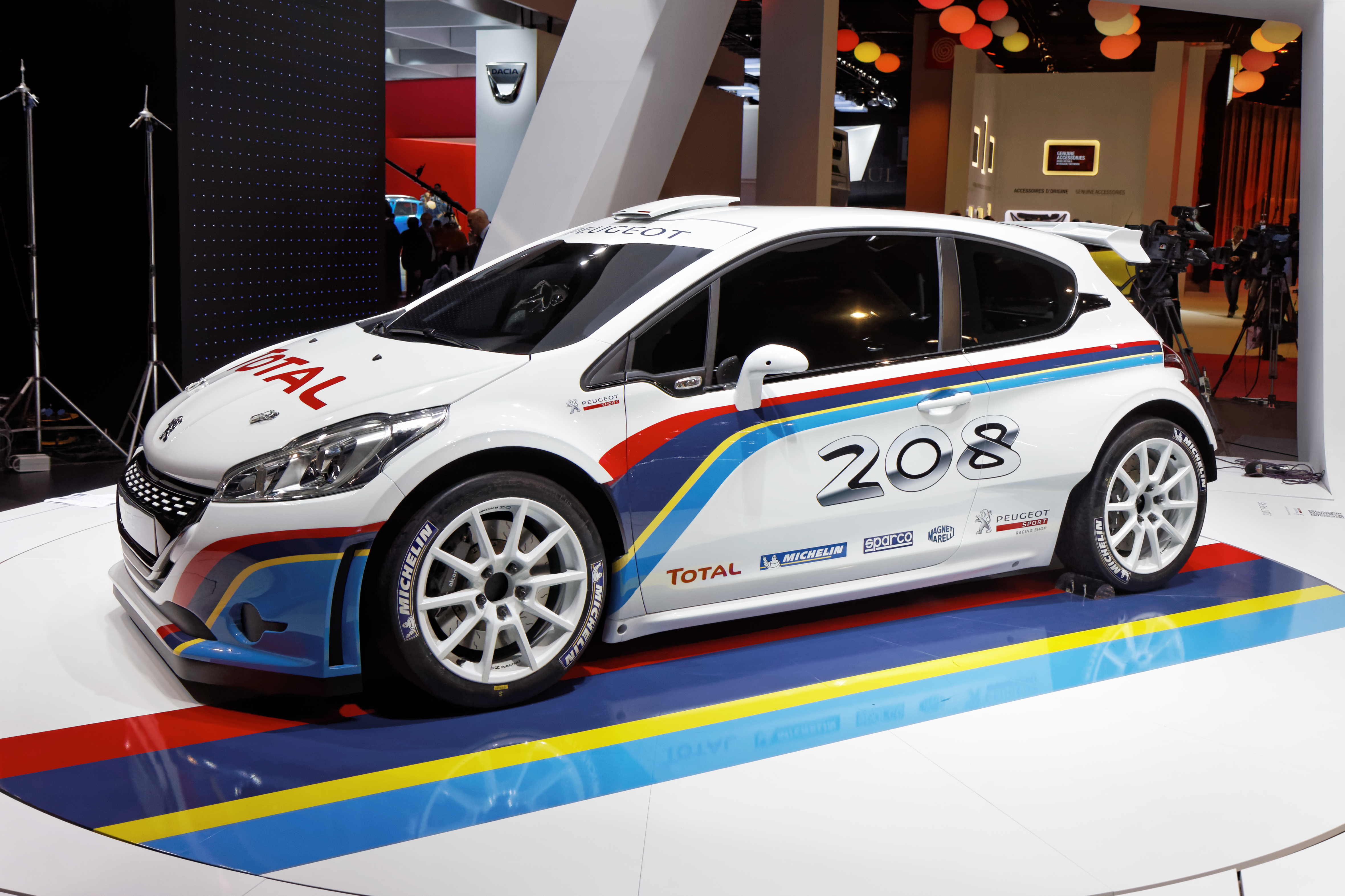 Une Peugeot 208 R5 présentée lors du Mondial de l'Automobile de Paris 2012.